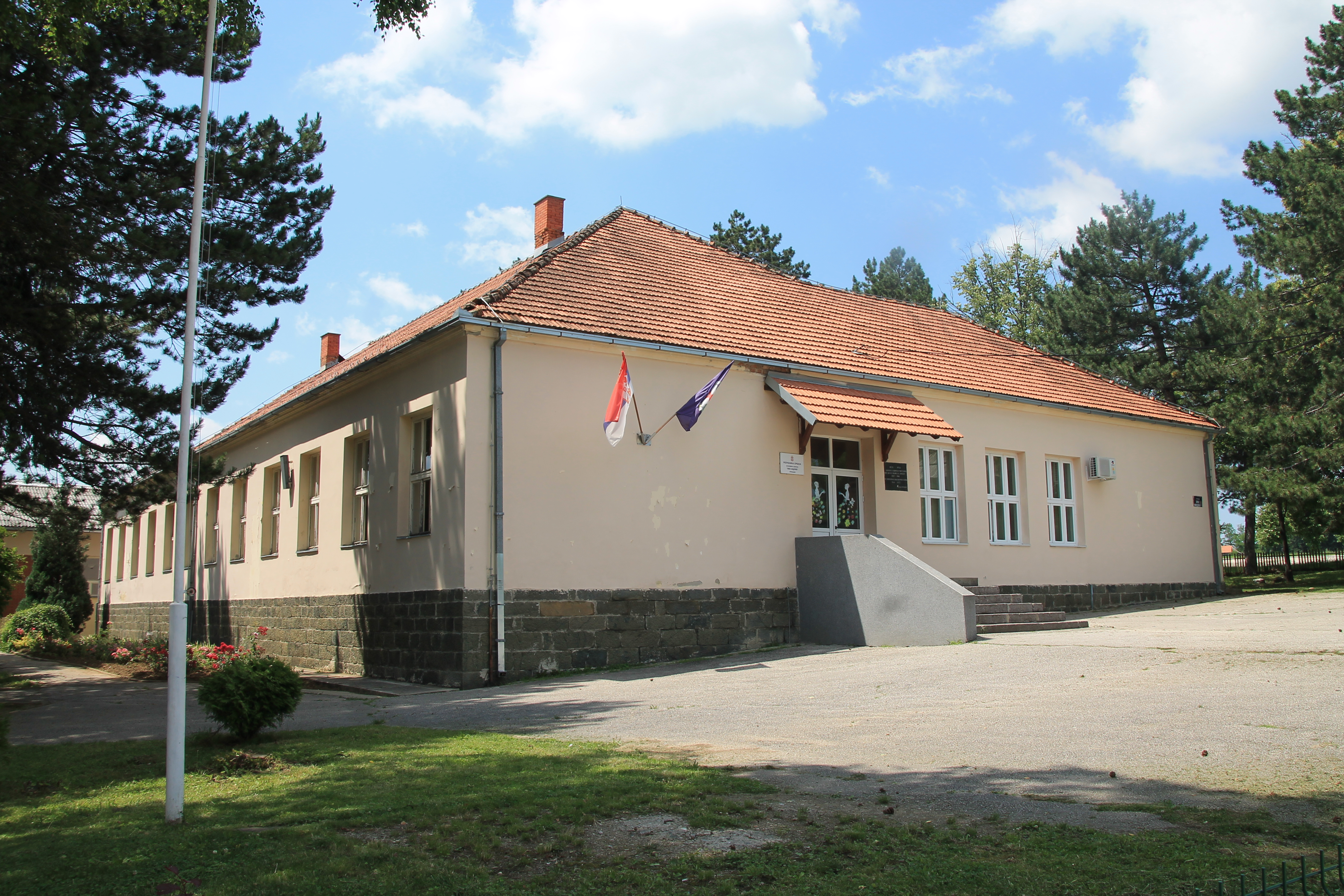 Pranjani